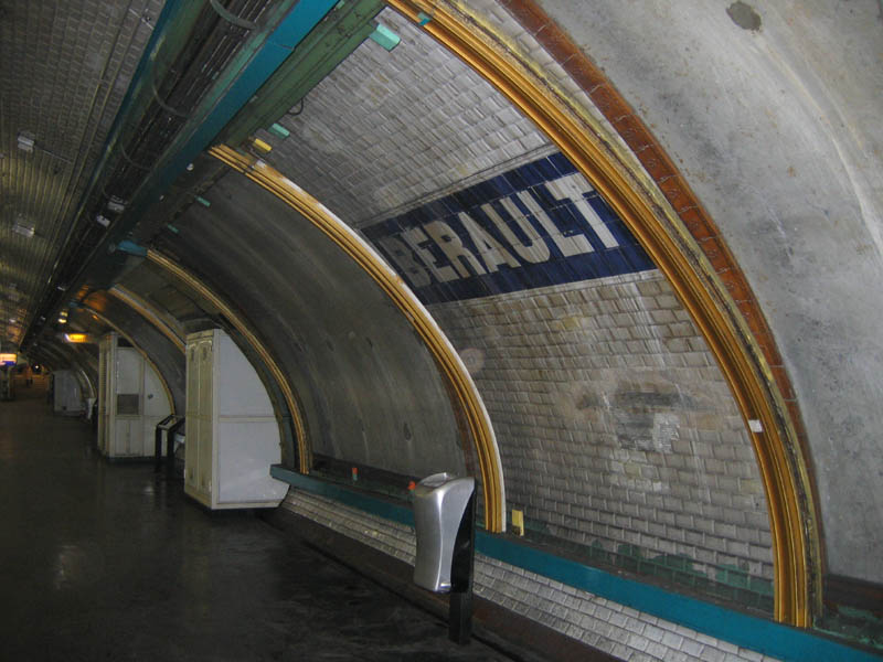 Métro paris, station Bérault, nom de la station carrelé sur le mur